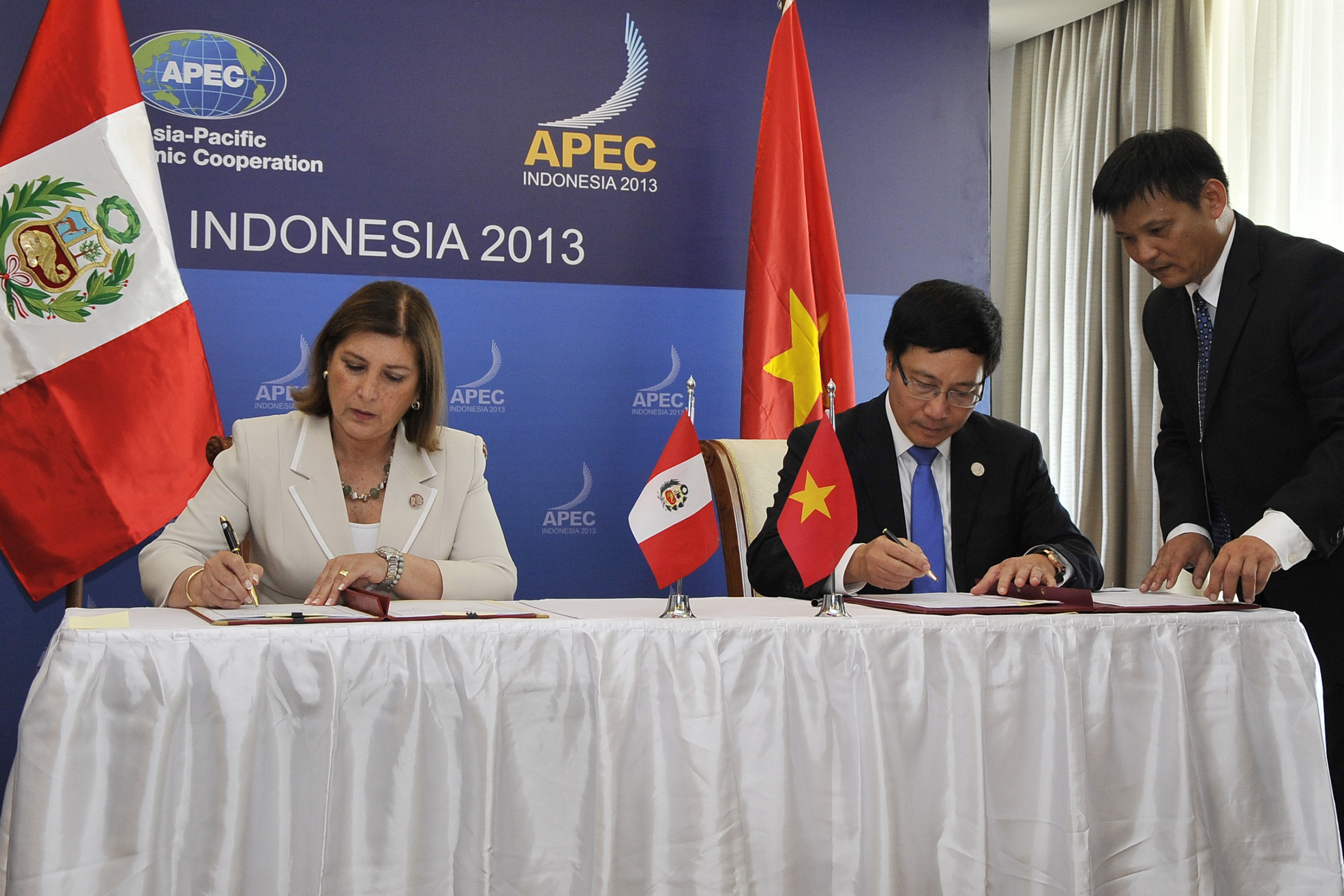 En el marco de la Cumbre APEC 2013, la Canciller Eda Rivas y su homólogo de Vietnam, Pham Binh Minh, suscribieron un Memorándum de Entendimiento y Cooperación a nivel de Presidencias de APEC. Como se conoce, el Perú asumirá la Presidencia de APEC en el año 2016 y se espera contar con el apoyo de todos los miembros a fin de concretar una agenda exitosa encaminada a alcanzar un mayor crecimiento económico y fortalecer la cooperación regional. Para lograr estos objetivos el Perú ha planteado, entre otras iniciativas, un Plan Multianual de Conectividad hasta el 2020. Al ser Perú (2016) y Vietnam (2017) sedes consecutivas del Foro APEC, se espera incrementar la vinculación y cooperación entre ambos paises, especialmente en materia de conectividad y en otras acciones afines.